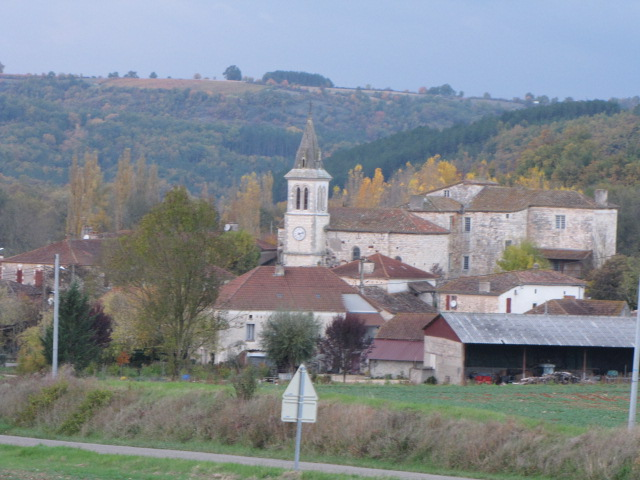 Le Boulvé